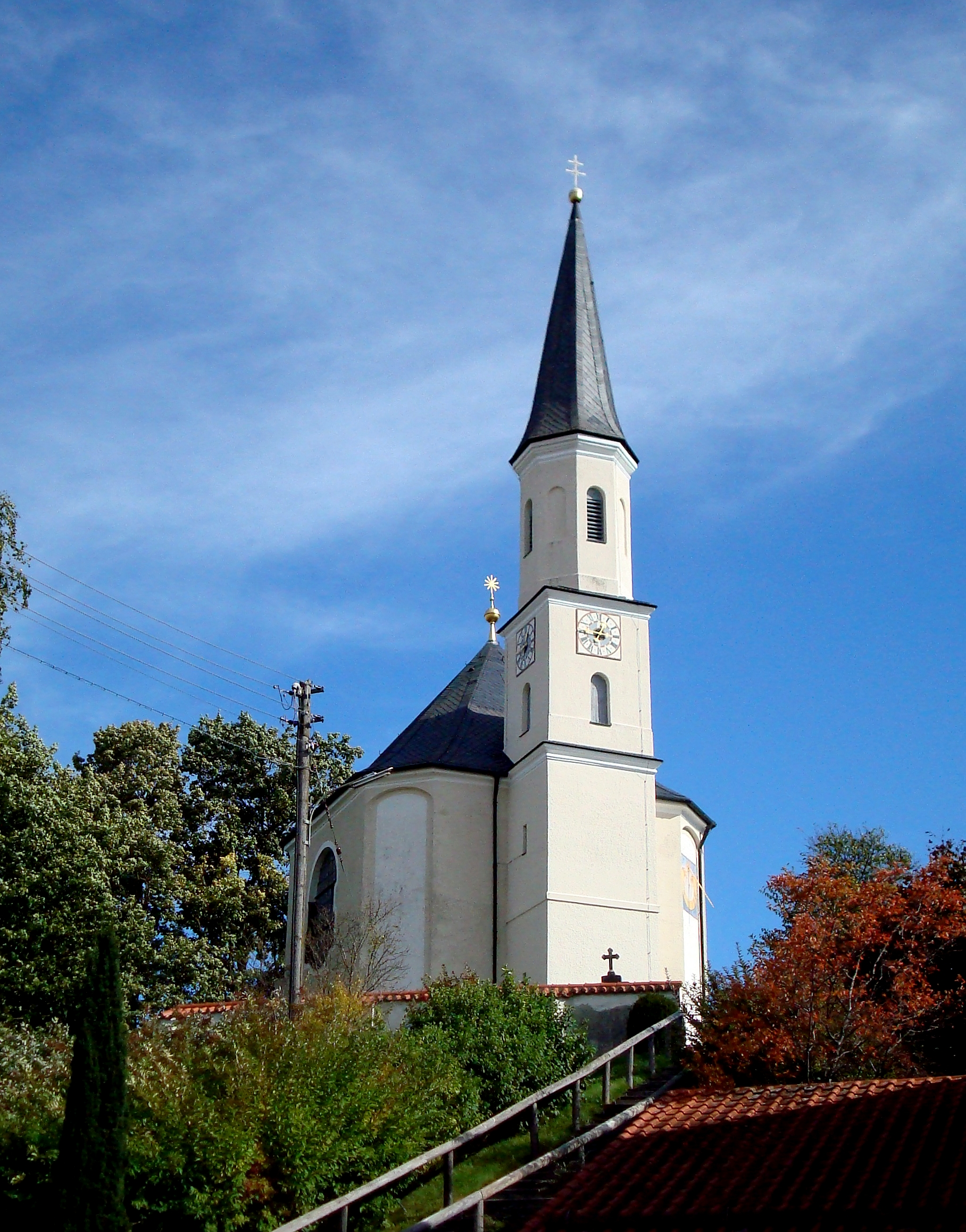 Seefeld, Ortsteil Unering, Kirche St. Martin. Die 1731 fertiggestellte Kirche ist ein Werk des bedeutenden Baumeisters Johann Michael Fischer. Nach dem Abbruch der baufälligen Vorgängerkirche entstand nach seinen Plänen auf einem Moränenhügel des Dorfes dieses barocke Sakralbauwerk. Es gilt als Prototyp für die späteren Zentralraumkirchen Fischers. Der Anbau des Kirchturmes erfolgte 1833.[1]